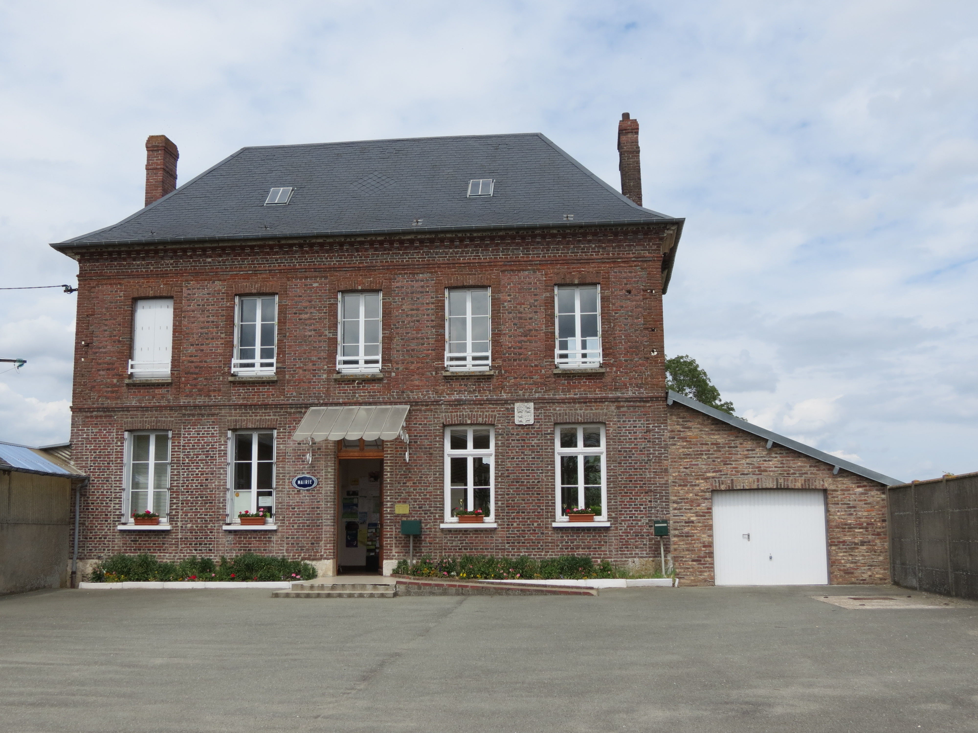 Mairie d'Amfreville-les-Champs